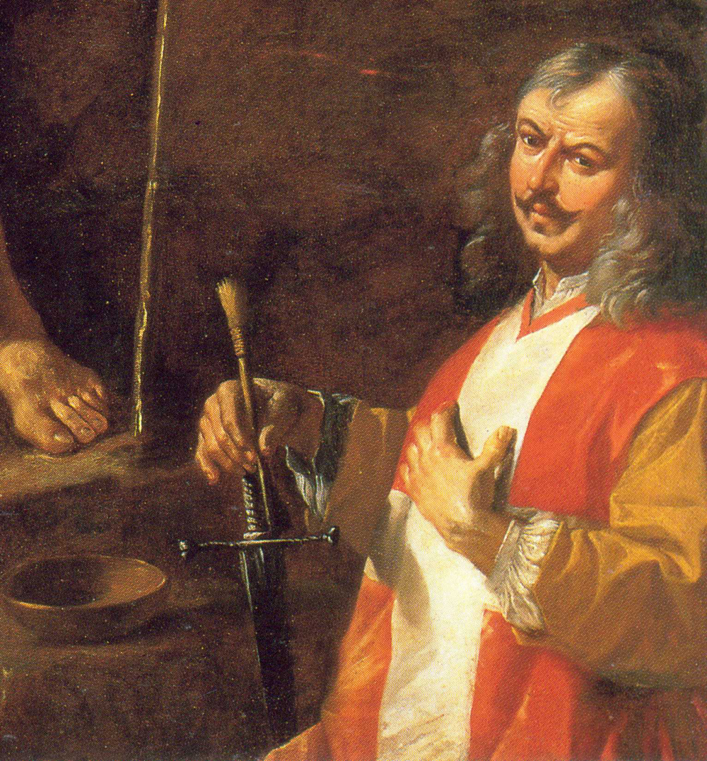 détail du tableau Predica di San Giovanni Battista avec l'auto-portrait de l'artiste, Mattia Preti. Église de San Domenico à Taverna (Calabre) en Italie, lieu de naissance de Preti.